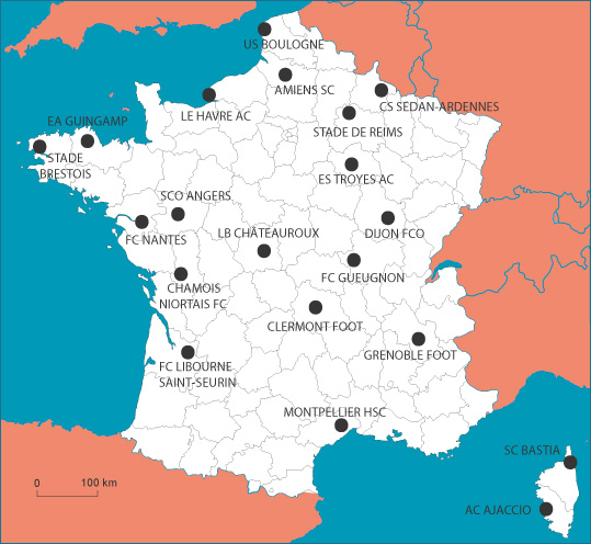 Localisation des clubs de football participant au championnat de france de Ligue 2 2007-2008